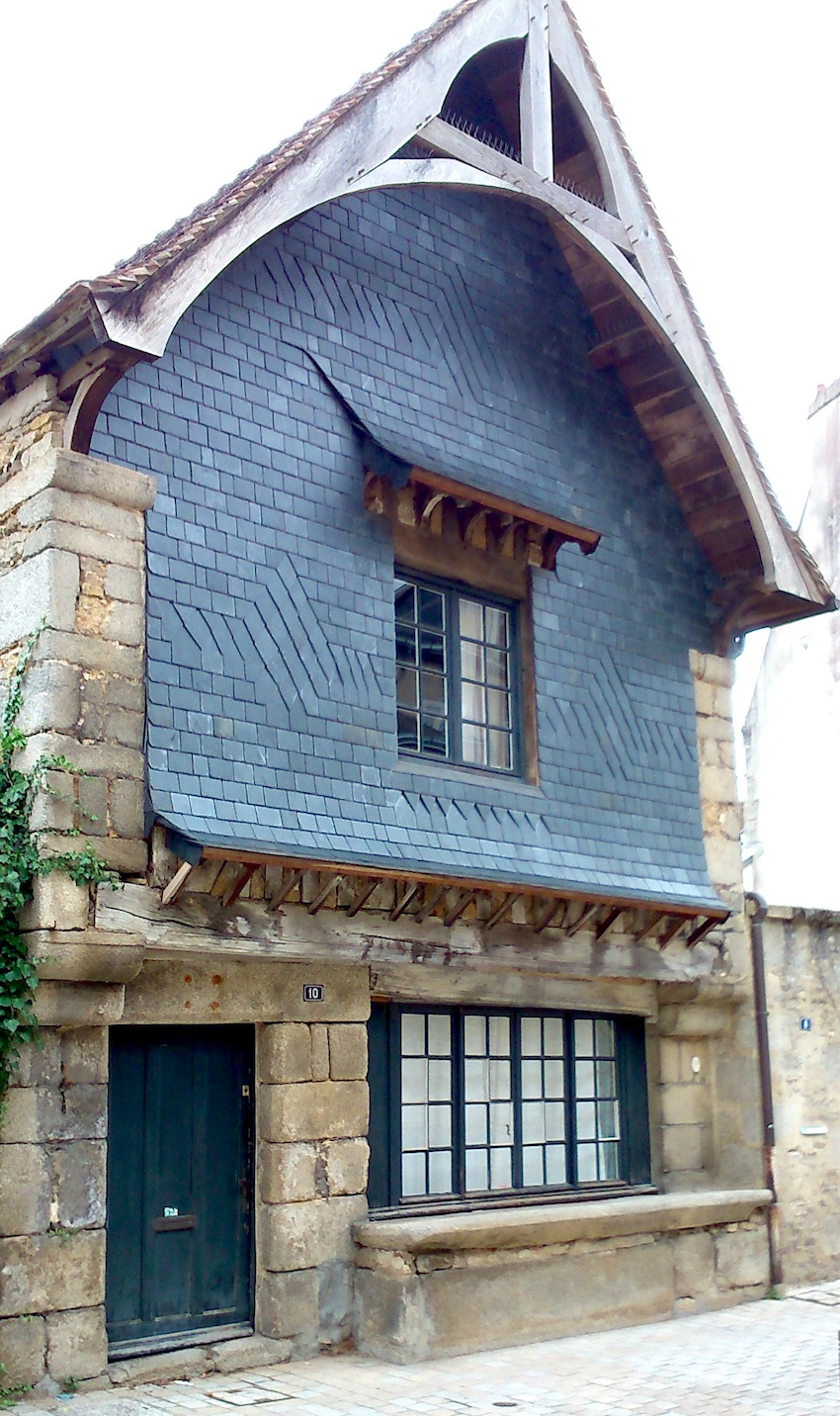 Façade de la Maison à l'Étal, Alençon (Nov. 2014)